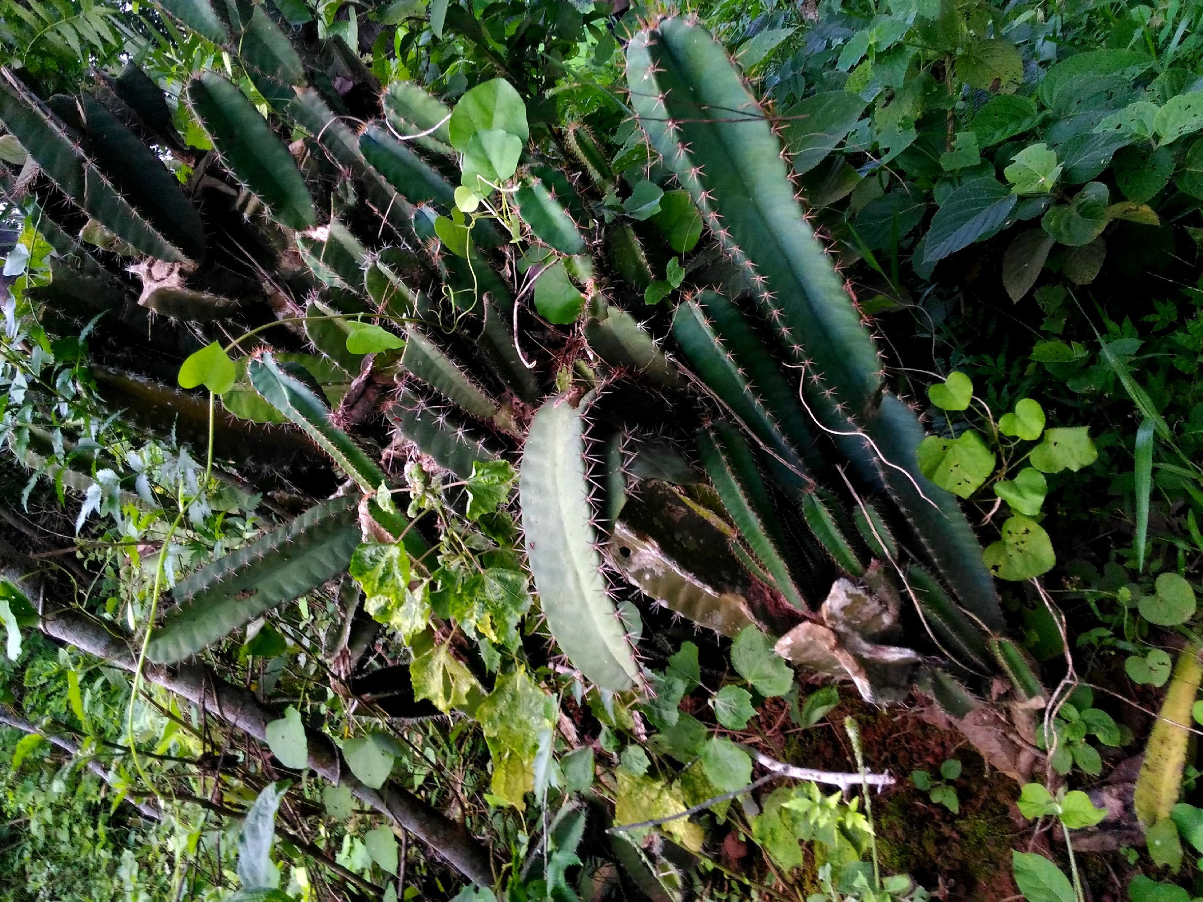 নানা প্রজাতির ক্যাকটাস রয়েছে ধানোরা মাউন্ডে